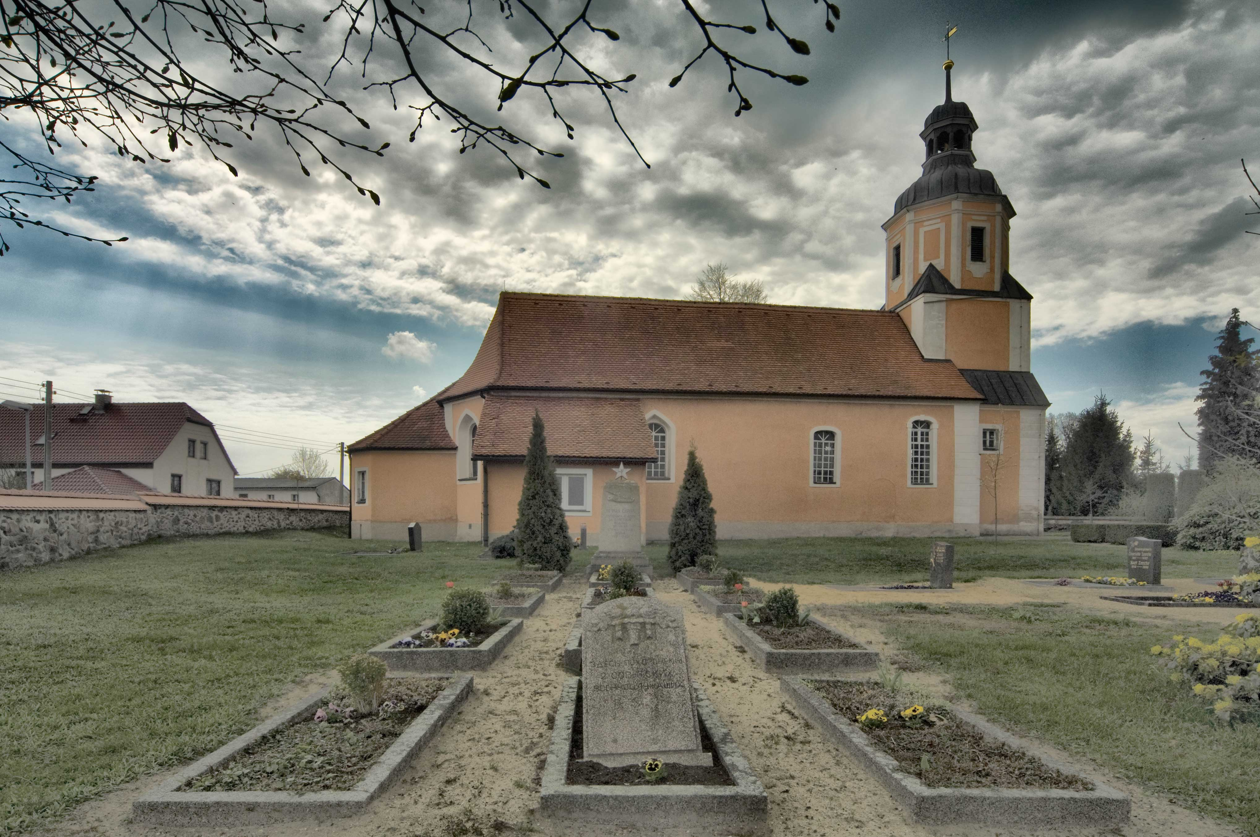 Das Sowjetdenkmal mit dem Panzer in Lampersdorf, Gemeinde Wermsdorf in Sachsen